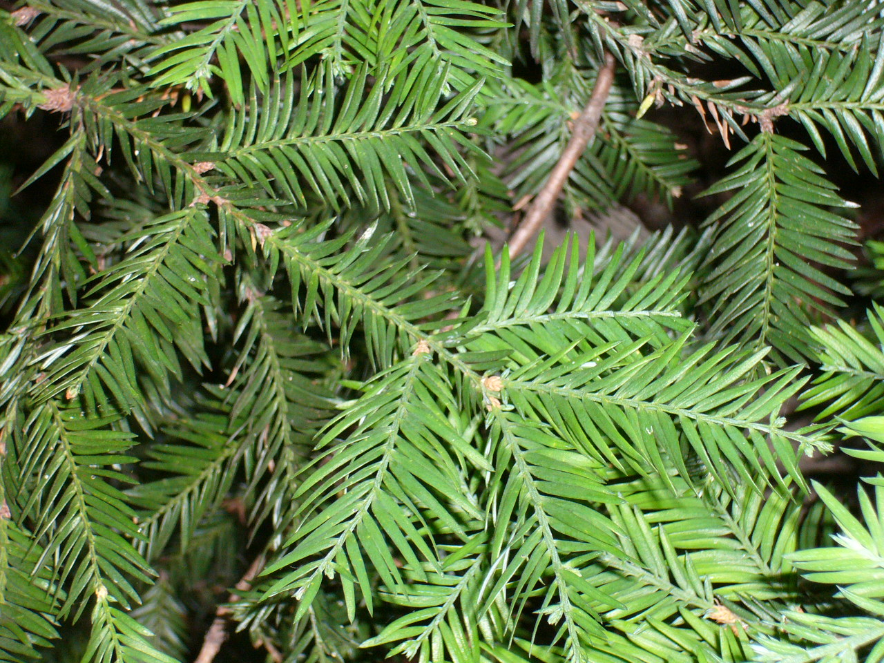 Sequoia sempervirens foliage